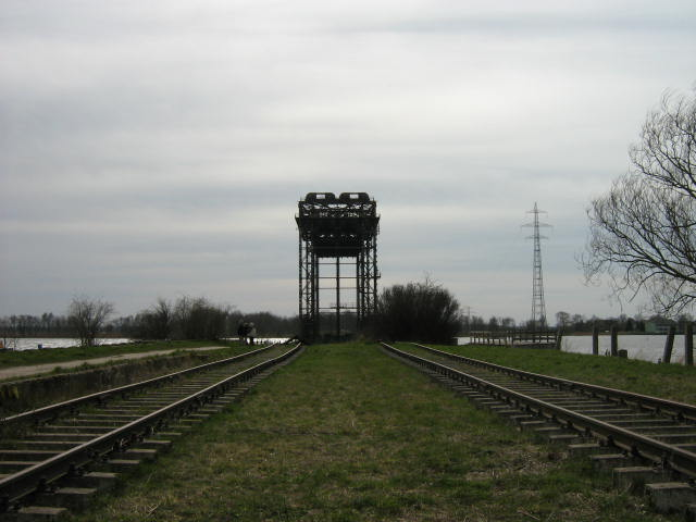 Pozostałości torów kolejowych i mostu w Karninie (Niemcy)